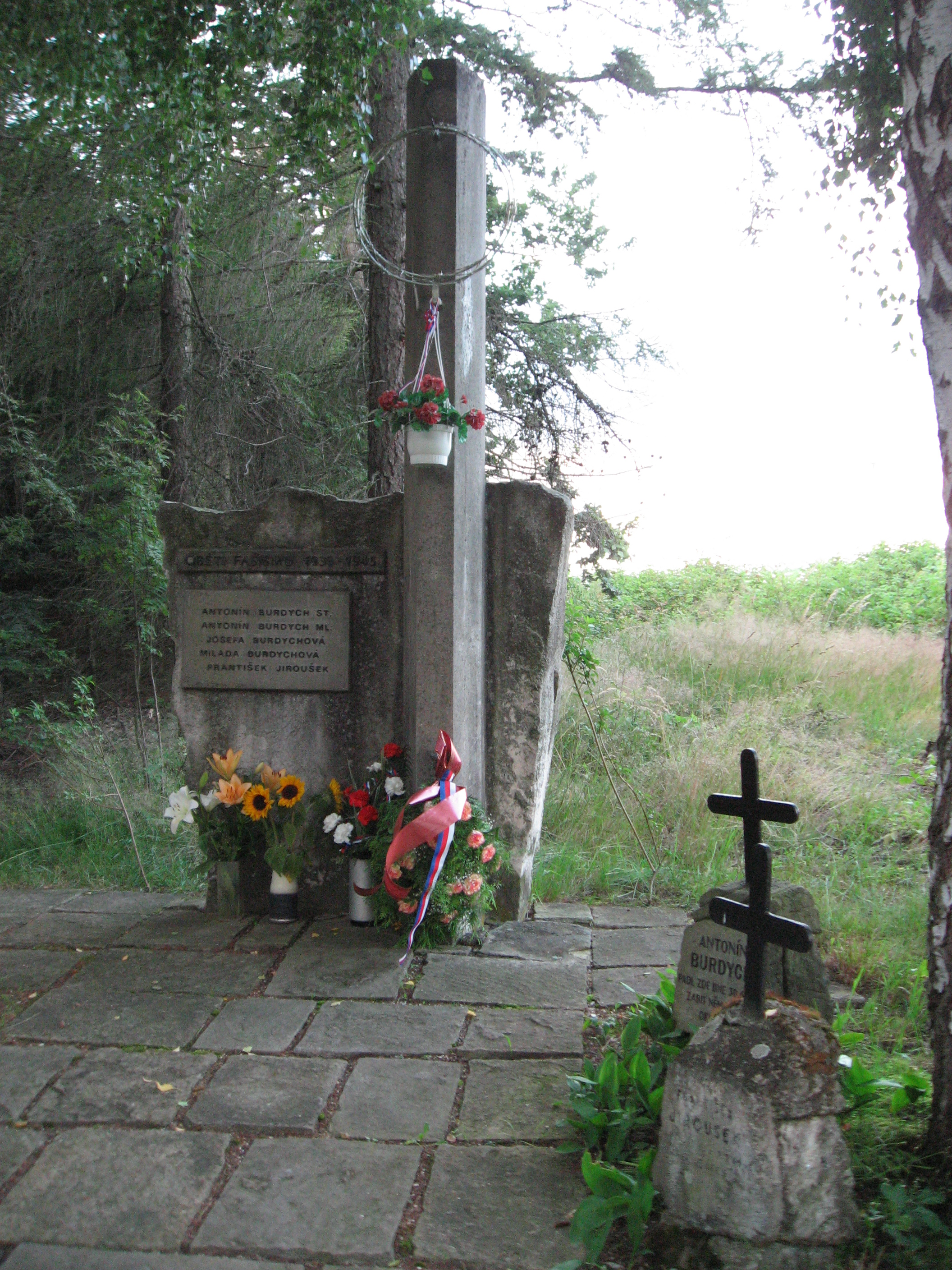 Česky: Kostelecké Končiny, památník